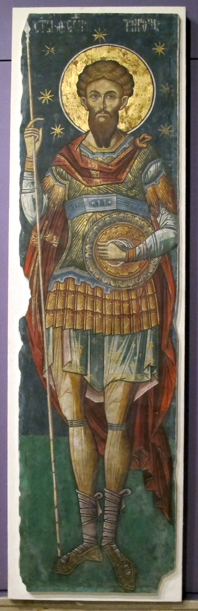 Vallacchia, pitture murali dal monastero di curtea de arges, san teodoro teron, ante 1526